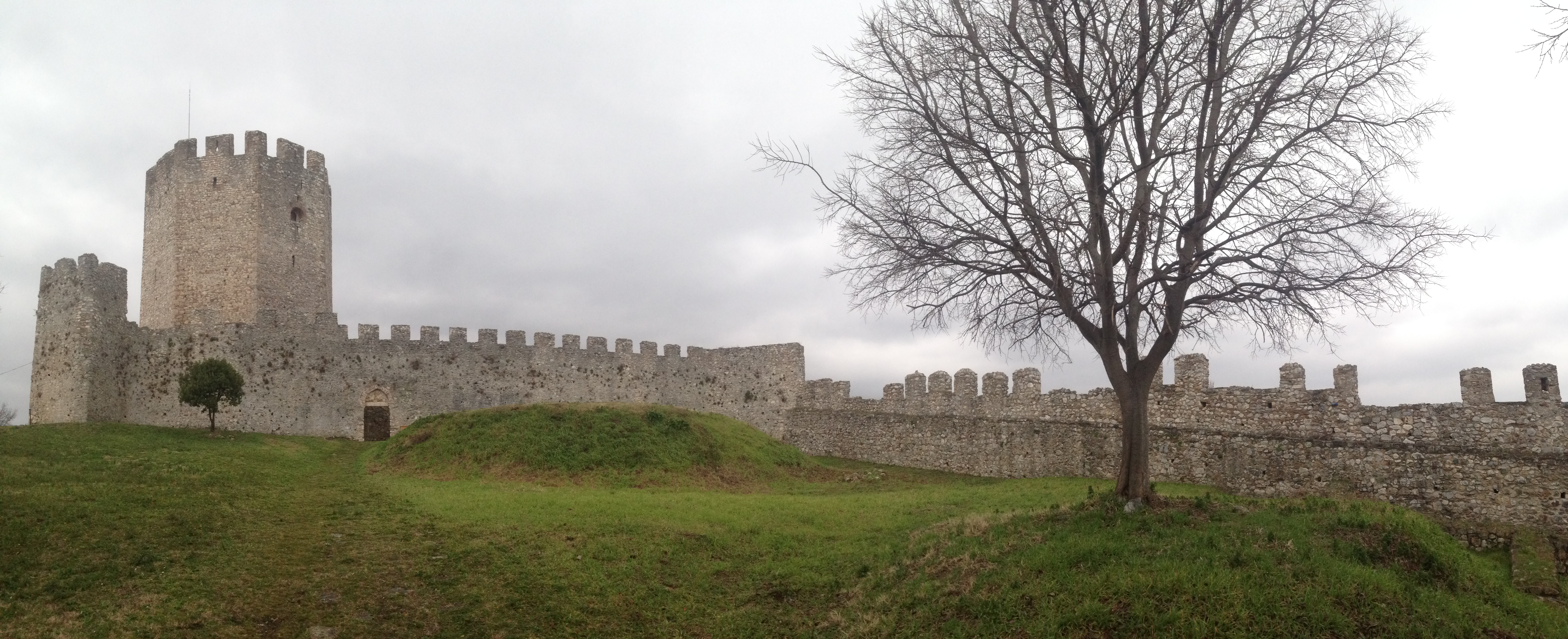 Κάστρο Πλαταμώνα«Κάστρο του Πλαταμώνα»